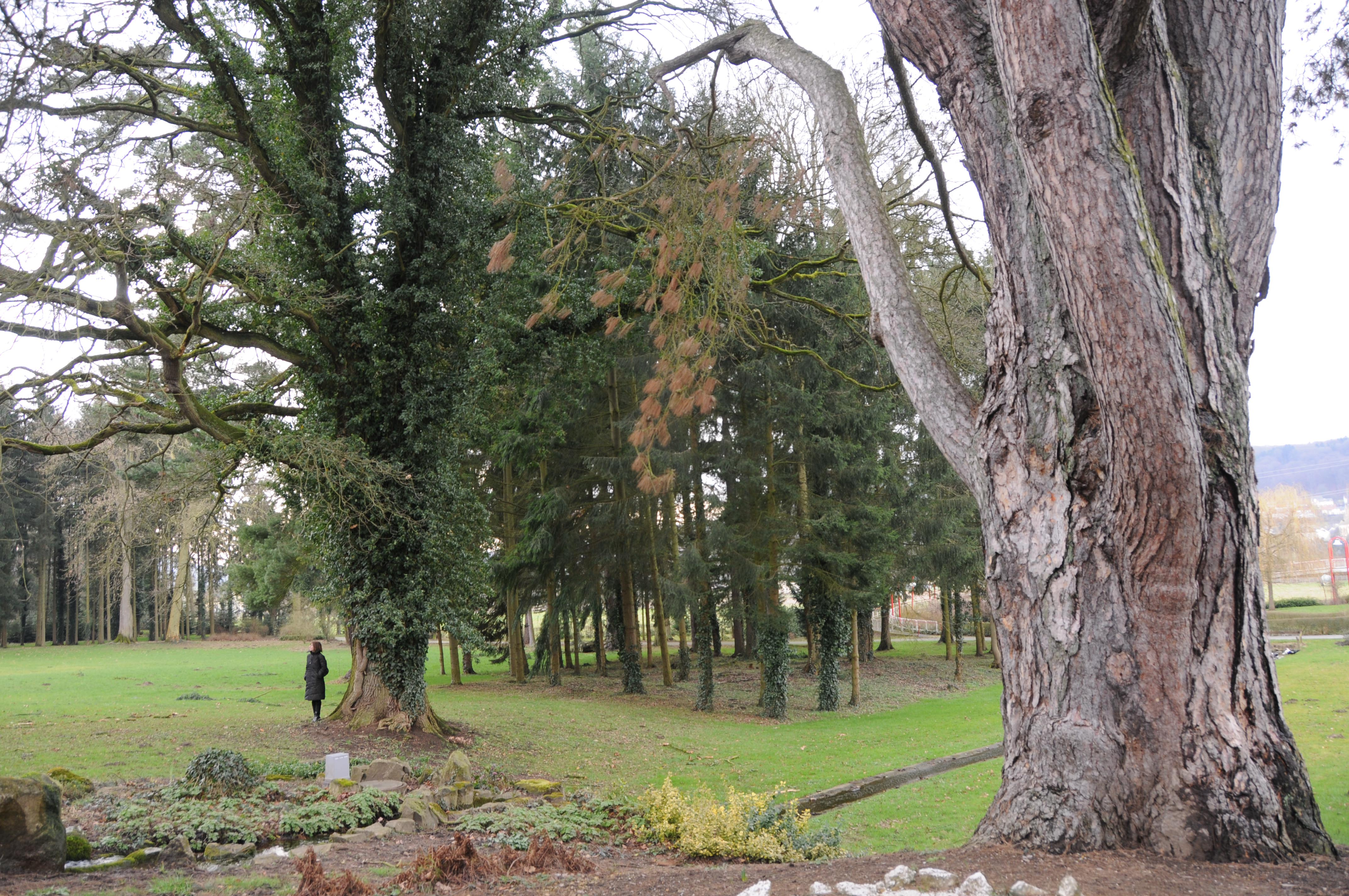 Schwaarzkifer an Eech am Park zu Heeschdref.